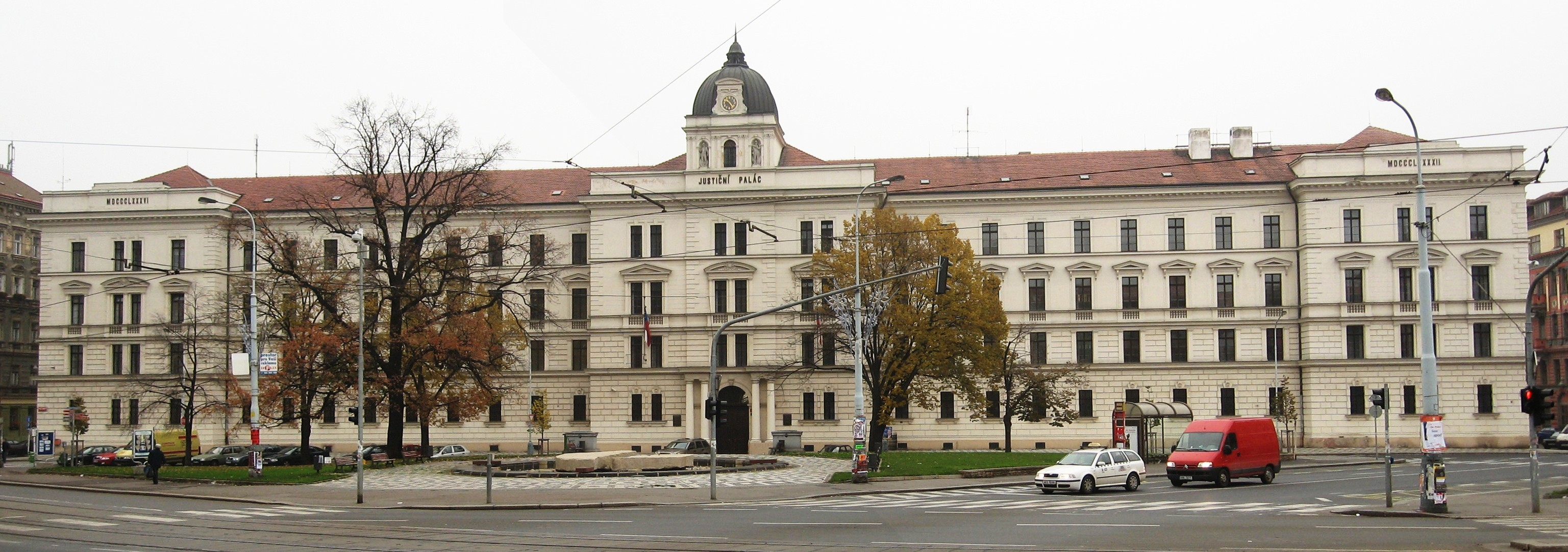 Česky: Justiční palác v Praze na Smíchově (složené ze dvou obrázků pomocí programu hugin)